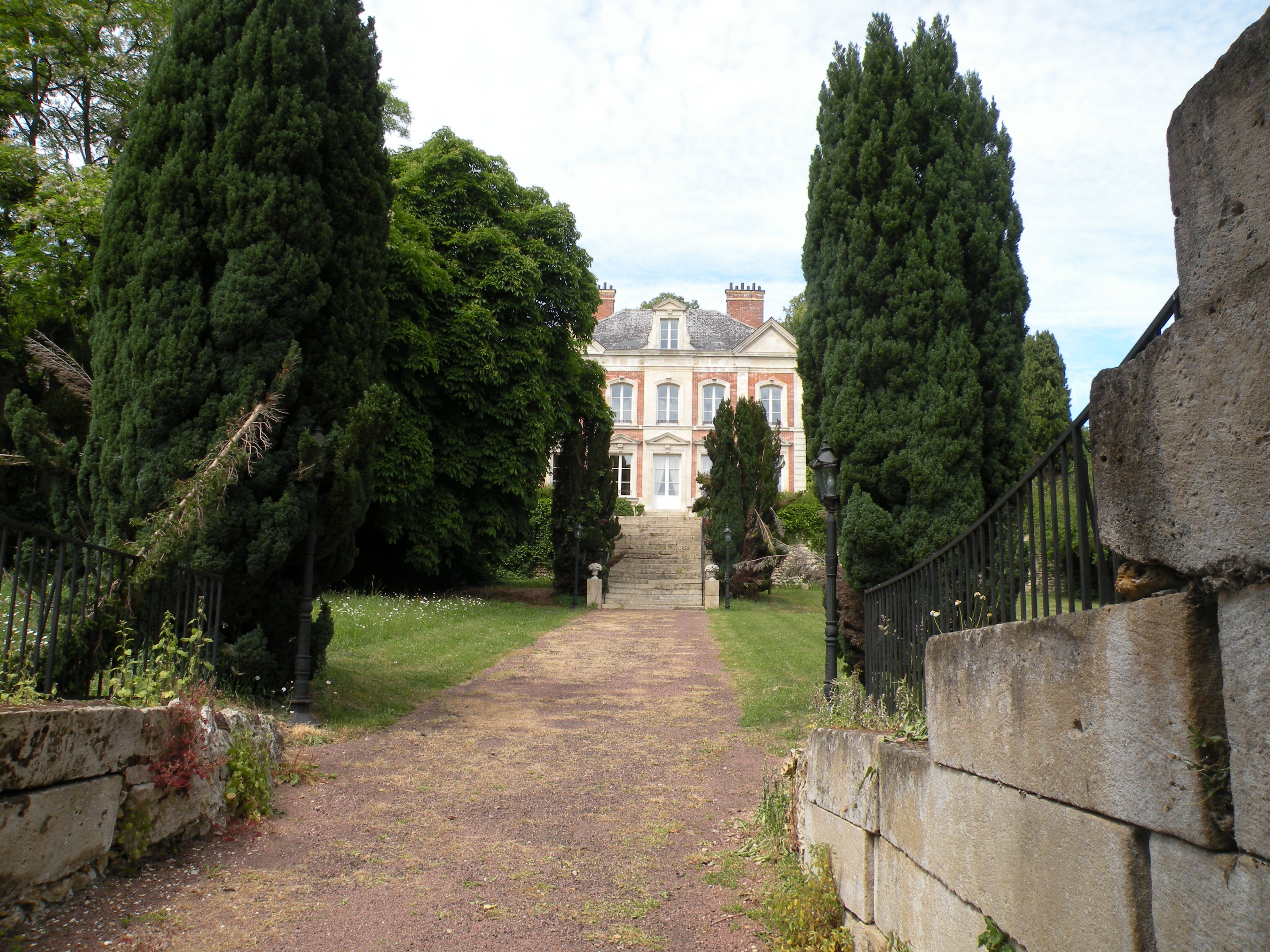 chateau de Boisemont (Val-d'Oise)